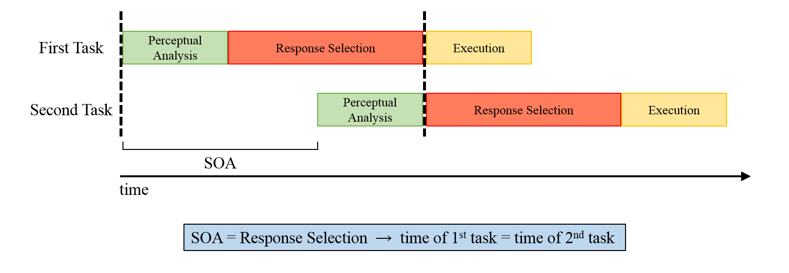 Psychological Refractory Period, Central Bottleneck Theory, Long SOA